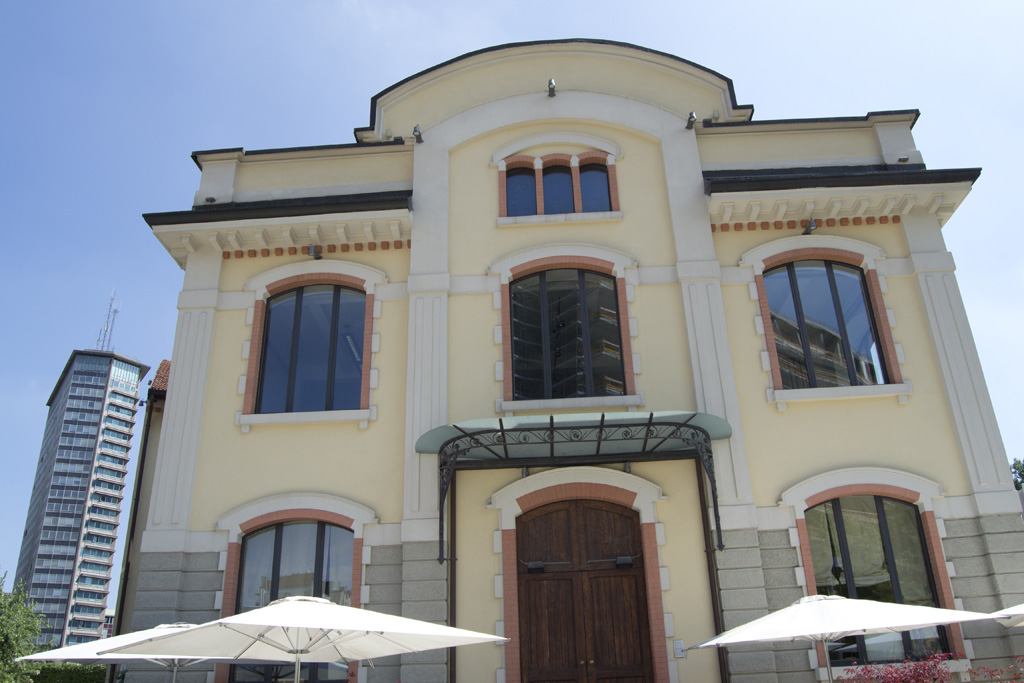 Sede della Fondazione Riccardo Catella in via De Castillia 28 a Milano